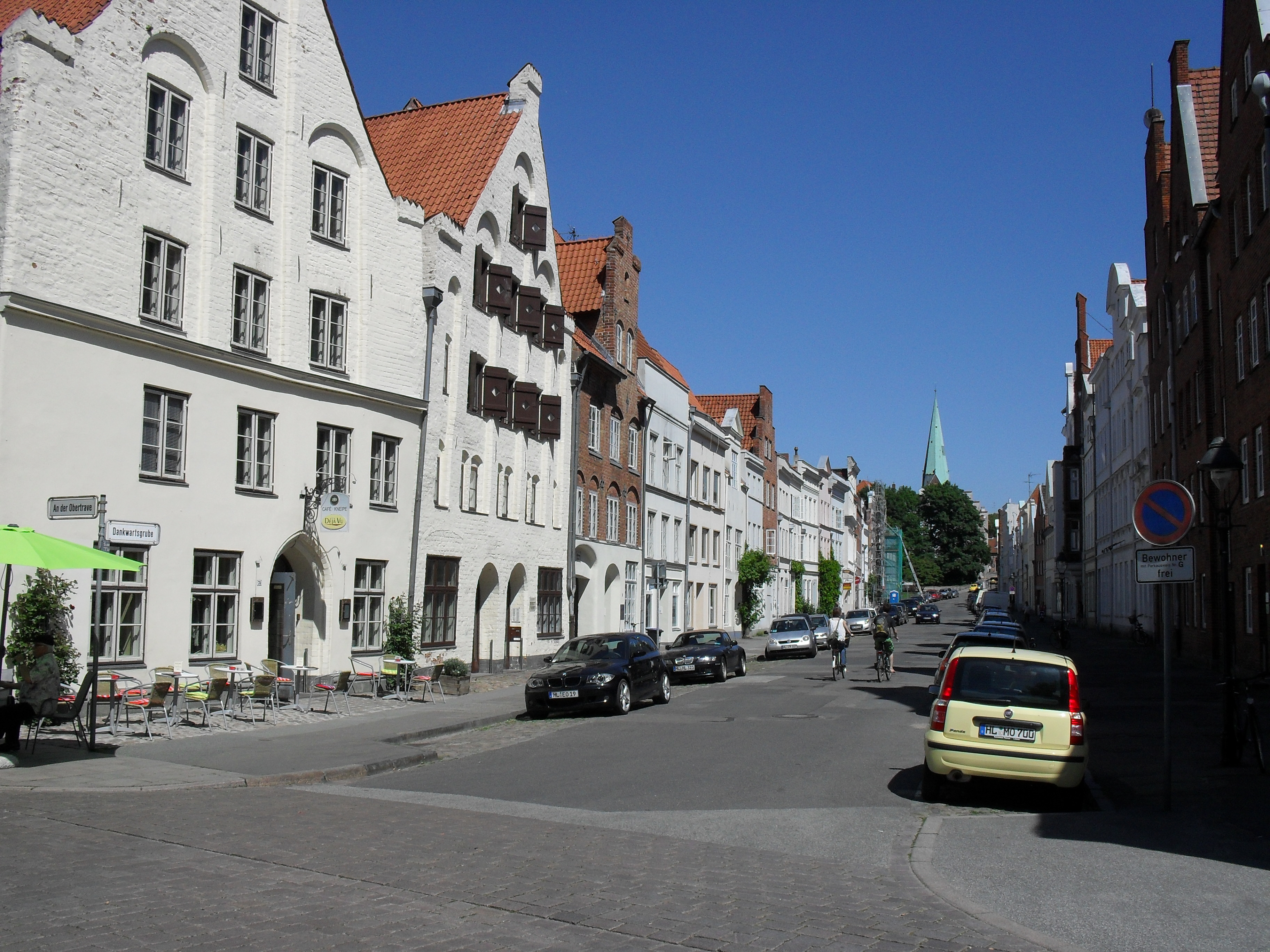 Die Dankwartsgrube in Lübeck